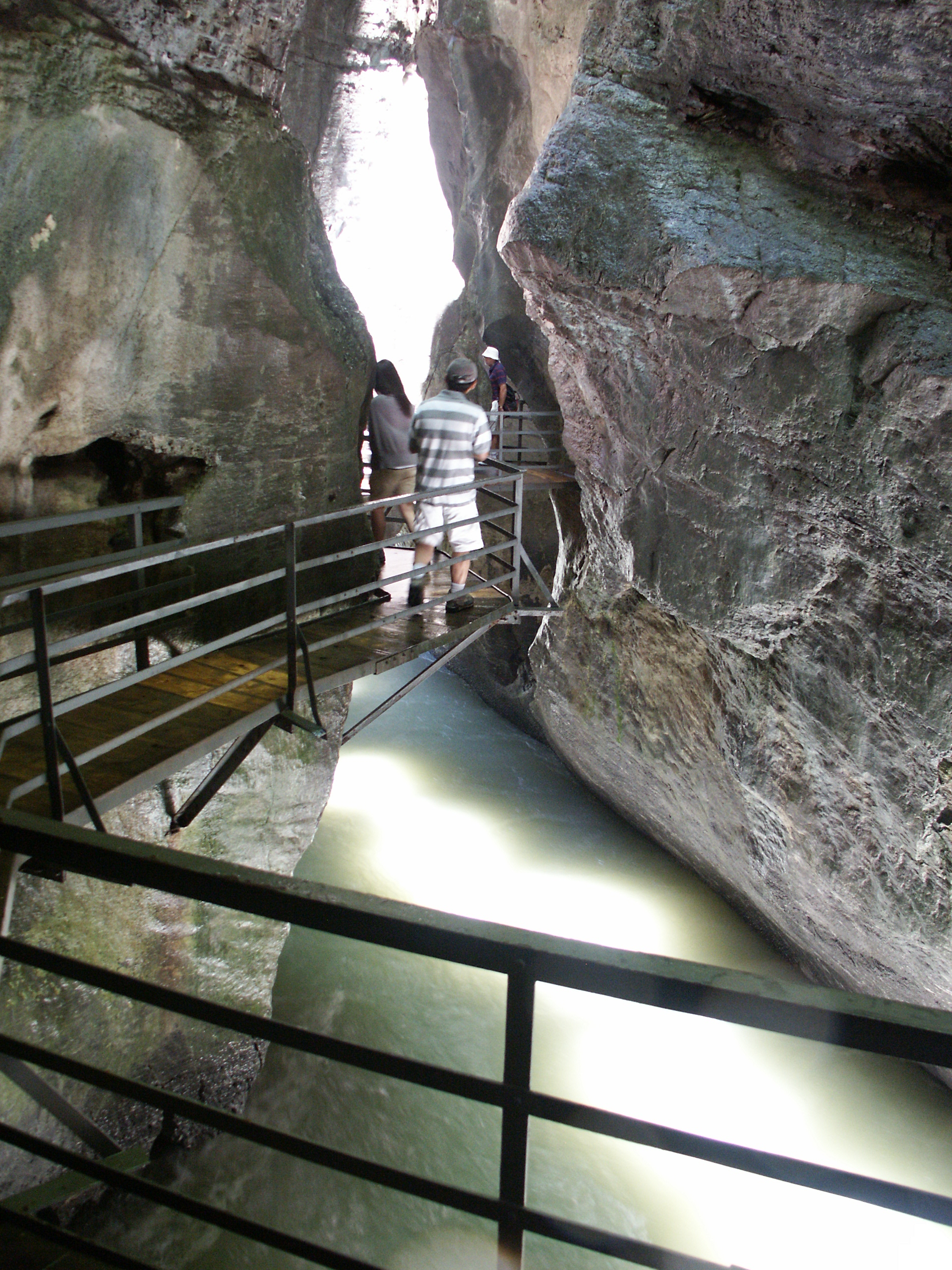 Eine grossartige Felsenschlucht welche durch den Fluss Aare in tausenden von Jahren gebildet wurde.